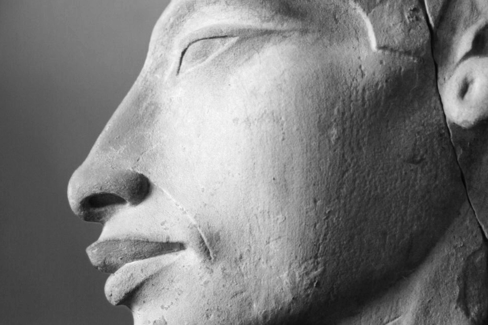 Imagen del faraón Akenaton tomada en el Museo de el Cairo